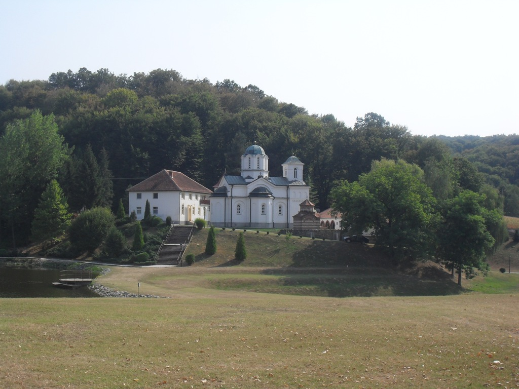 Манастир Каона, Епархија шабачка, Србија